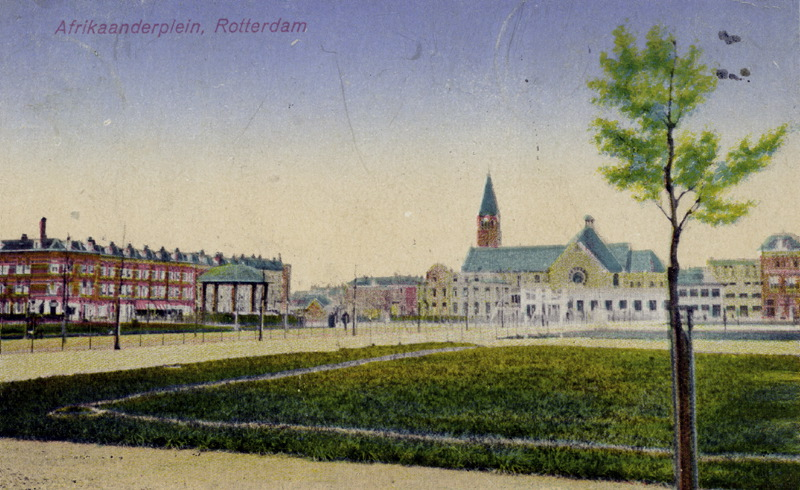 Gezicht op het Afrikaanderplein met de muziektent en met op de achtergrond de Sint-Franciscuskerk aan de Paul Krugerstraat, uit het zuidwesten. Nummer: PBK-134 Titel:Afrikaanderplein, Rotterdam Beschrijving: Gezicht op het Afrikaanderplein met de muziektent en met op de achtergrond de Sint-Franciscuskerk aan de Paul Krugerstraat, uit het zuidwesten. Datering: 1930 Toegangsnummer: 4029 Collectie: Prentbriefkaarten verzameld door het Stadsarchief Rotterdam Auteursrechthouder: Anoniem Auteursrechtelijk beschermd: Nee Documentsoort: Prentbriefkaart